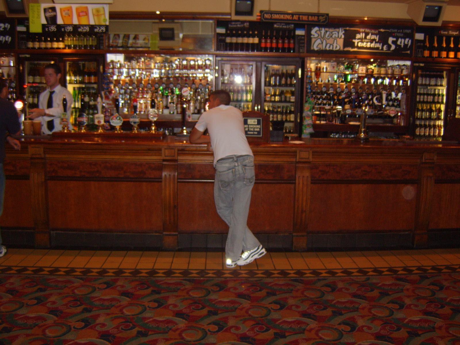 Pubbelső valahol Angliában